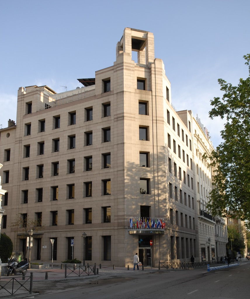 sede OIJ